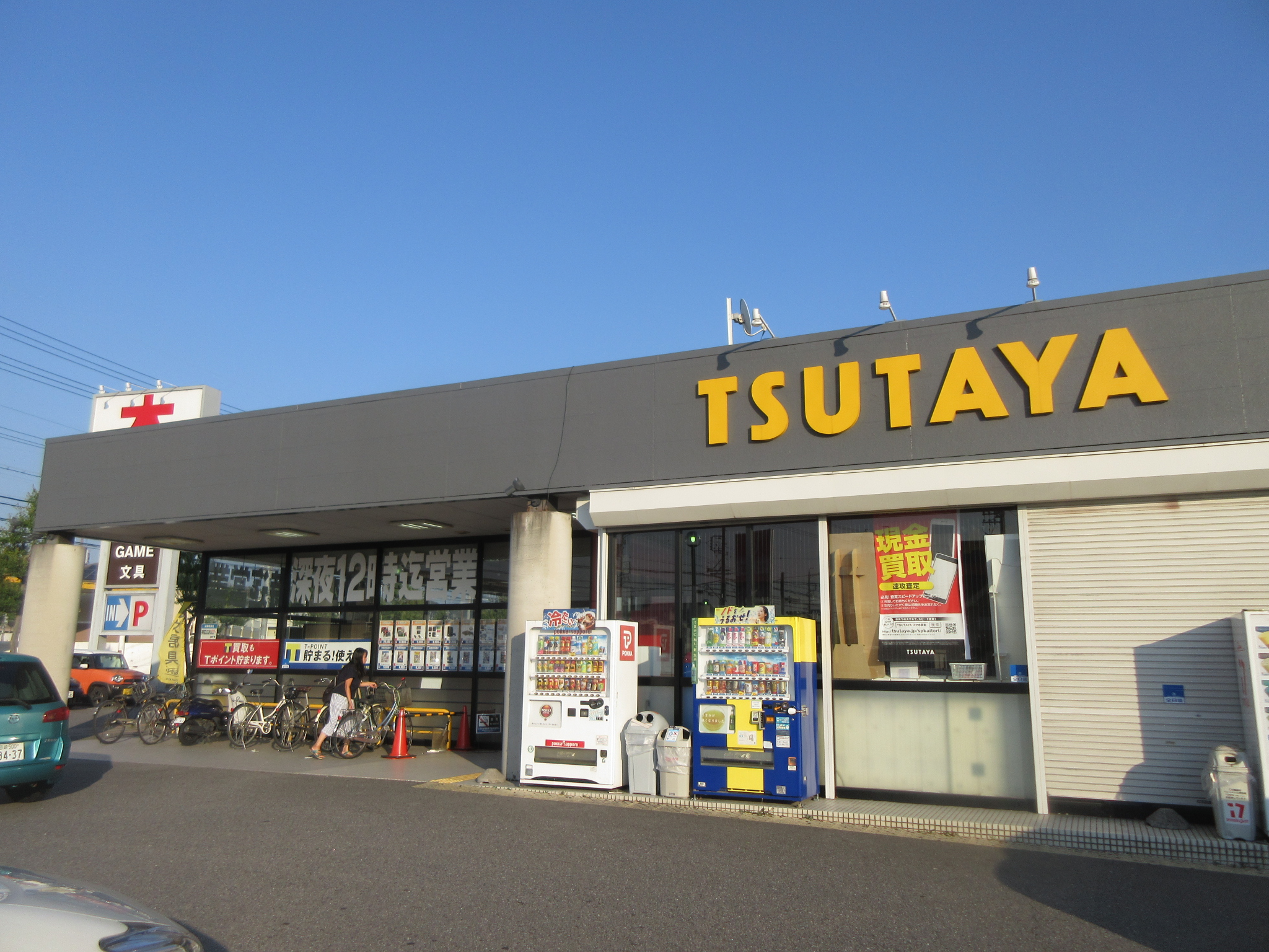 TSUTAYA岡崎インター店（岡崎市洞町）